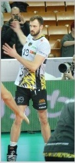 Bradley Gunter (Trefl Gdańsk). Zdjęcie zrobione podczas meczu finałowego Pucharu Polski w Hali Stulecia we Wrocławiu.